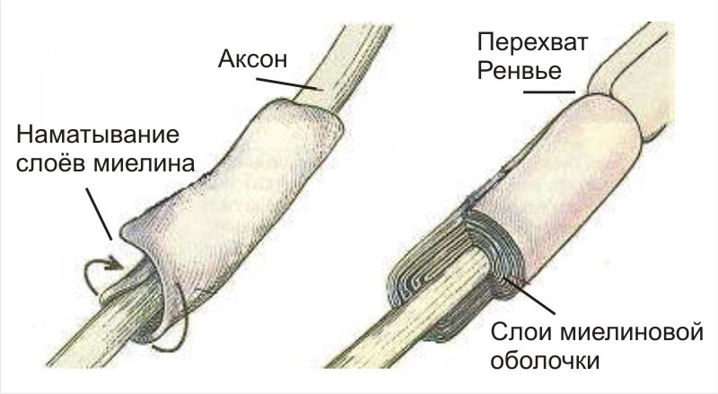 Миелиновое покрытие нервного волокна